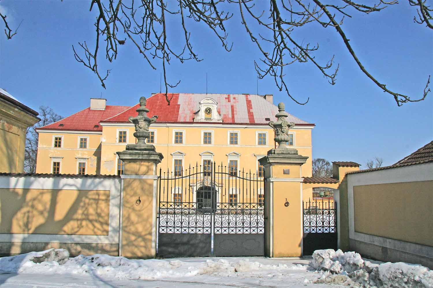 budova zámku ve Zdechovicích